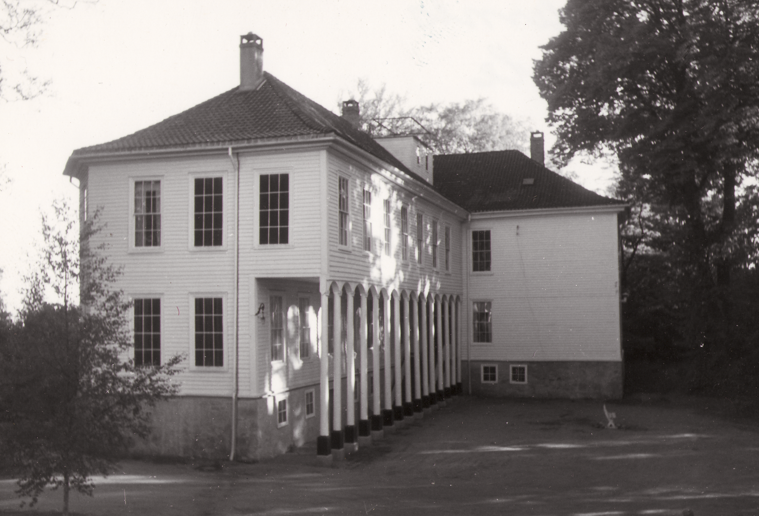 Gimle i Oddernes, Vest-Agder This image on crowdsourcing geotagging platform Fotodugnad